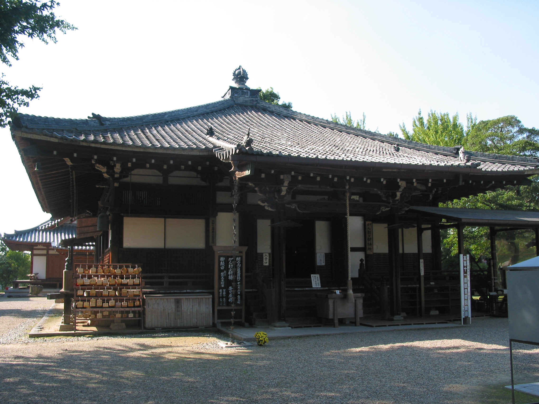 Hondō of Daian-ji at Nara, Nara Pref., Japan. 高野山真言宗別格本山大安寺本堂 奈良県奈良市大安寺2丁目で撮影